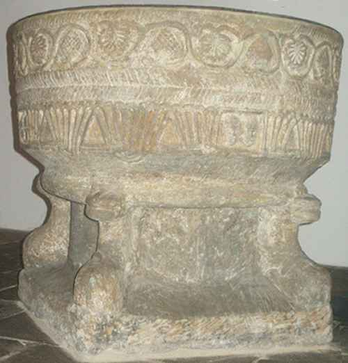 Kalkar-Wissel, St. Clemenskirche: zandstenen doopvont (ca. 12e eeuw)